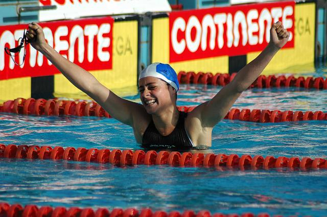 Nuno Almeida, nadador